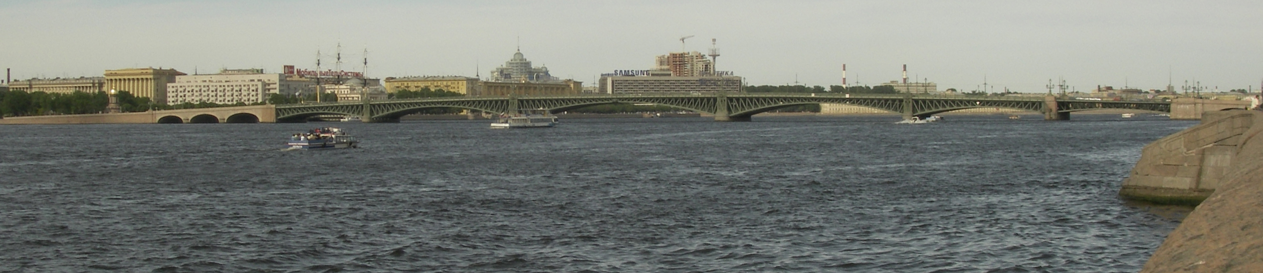 Троицкий мост (Санкт-Петербург)